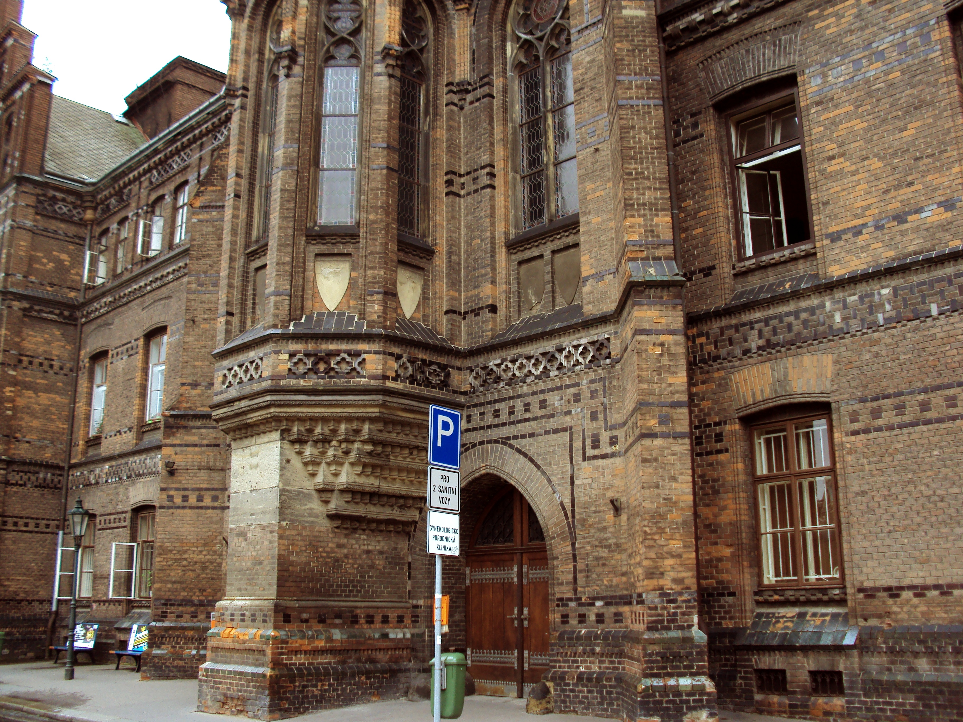 Všeobecná fakultní nemocnice, Gynekologicko porodnická klinika, U Apolináře, Praha 2